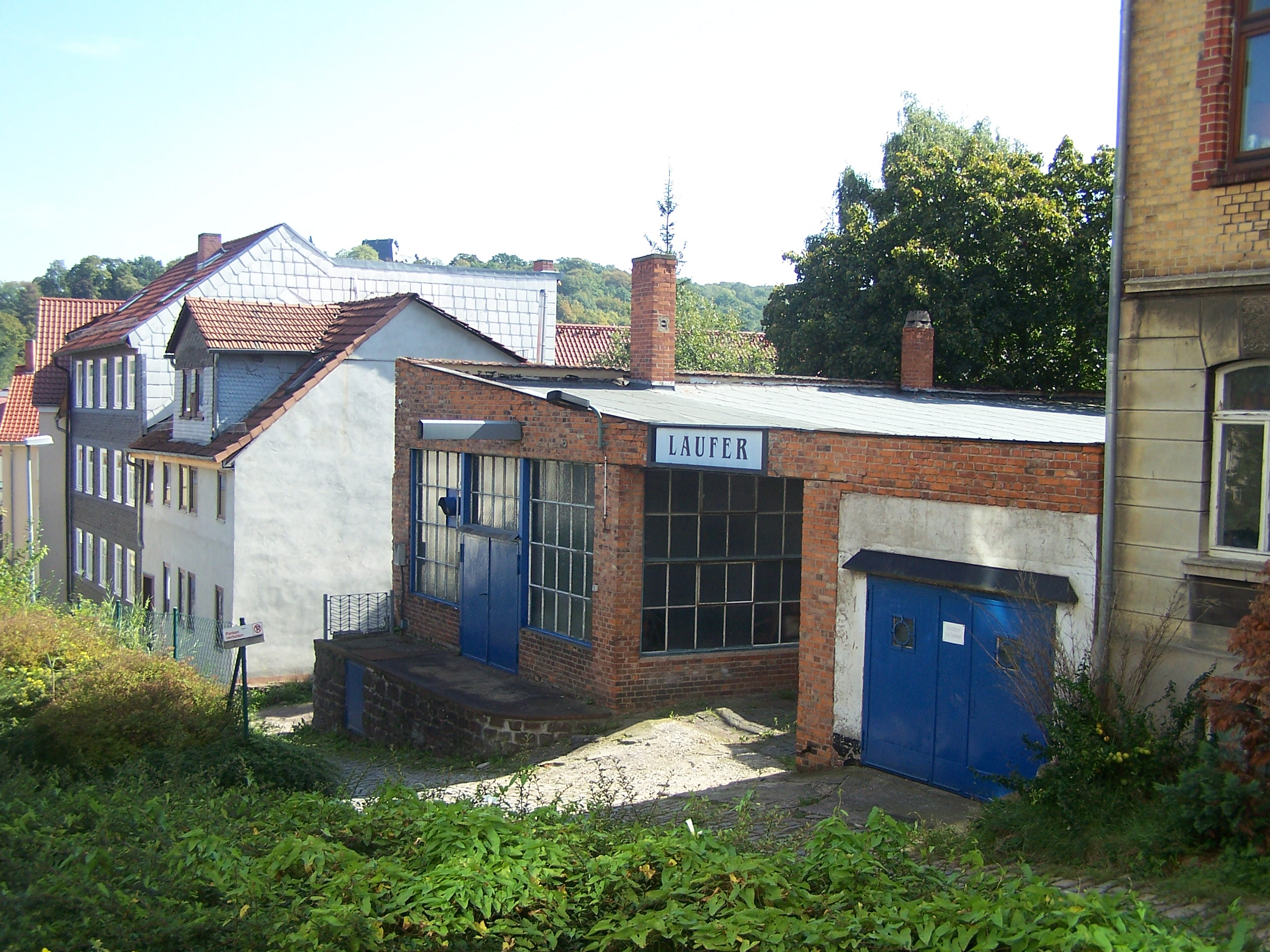 Die Arbeitsräume der (ehemaligen) Schmiedewerkstatt Laufer befinden sich im hinteren Grundstücksareal - hier der Zugang aus Richtung Große Wiegardt.